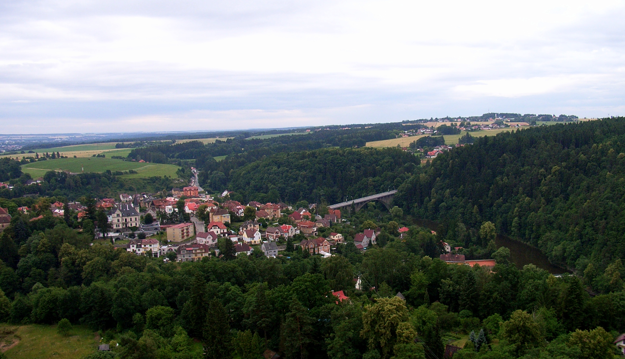 Česky: Vrch Hýlačka (525 m n. m.) nad městem Táborem.